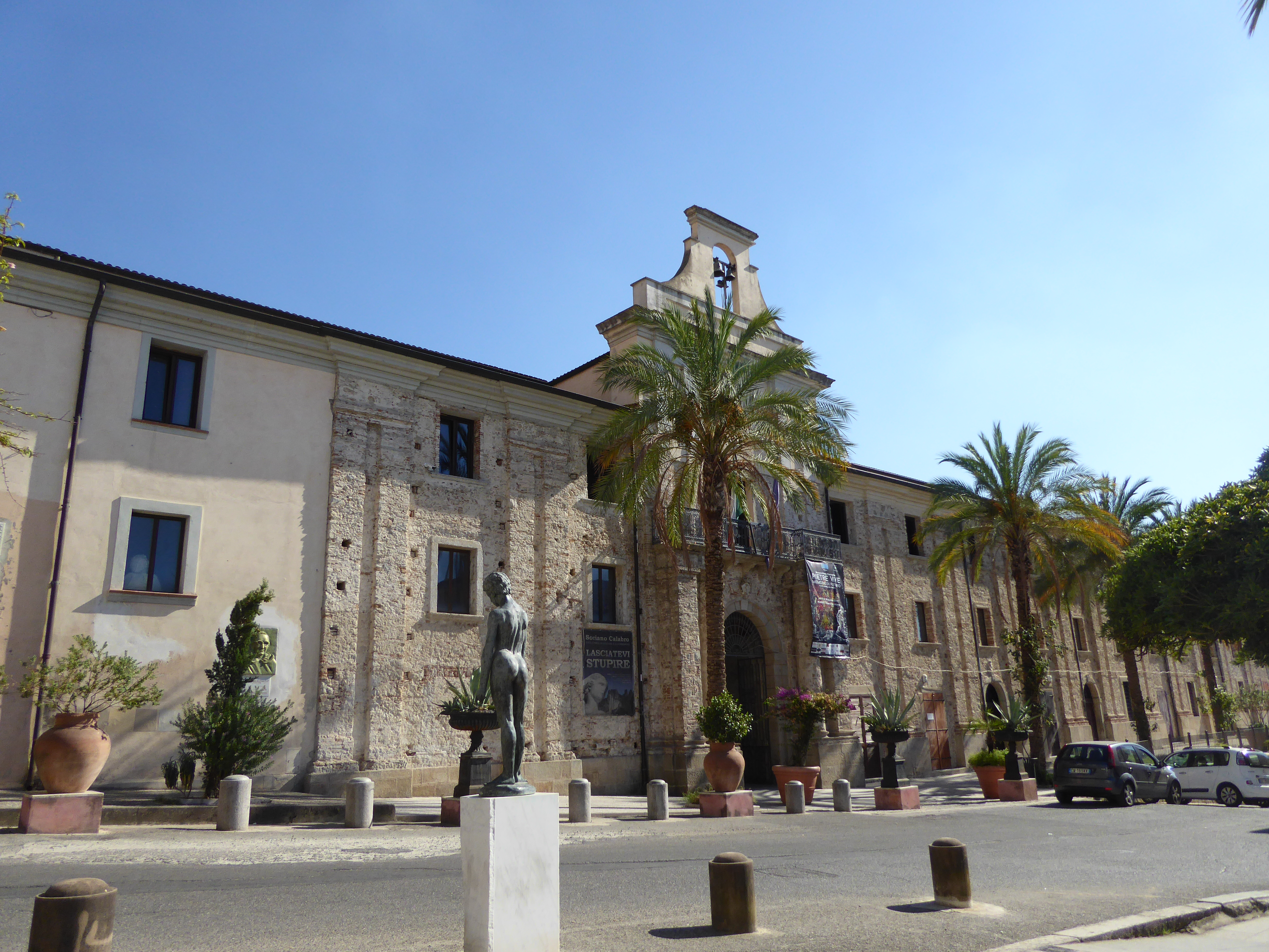 Municipio di Soriano Calabro - agosto 2017